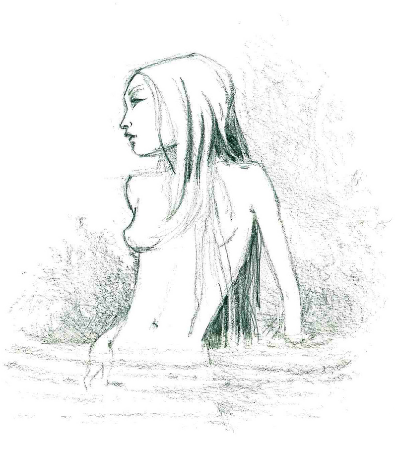 Disegno della fata acquatica Longana